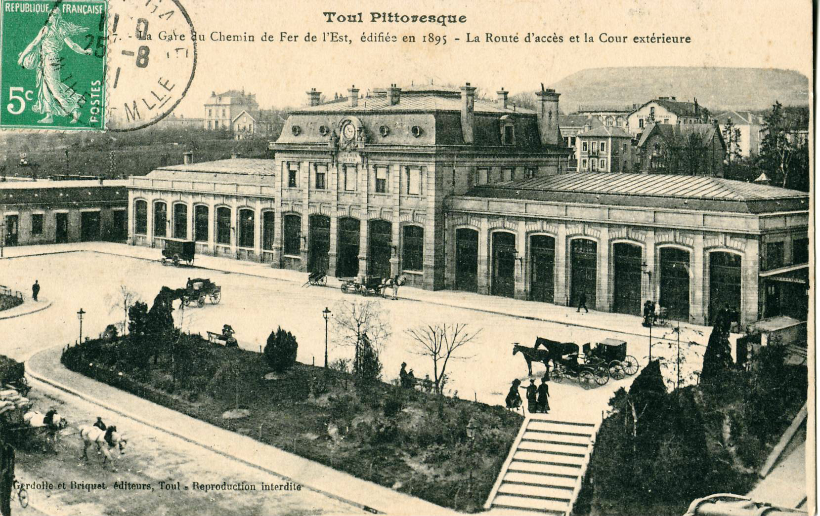 Carte postale ancienne éditée par Gerdolle et Briquet à Touln collection Toul Pittoresque, n°7 : TOUL - La Gare du Chemin de Fer de l'Est, édifiée en 1895 - La route d'accès et la cour extérieure